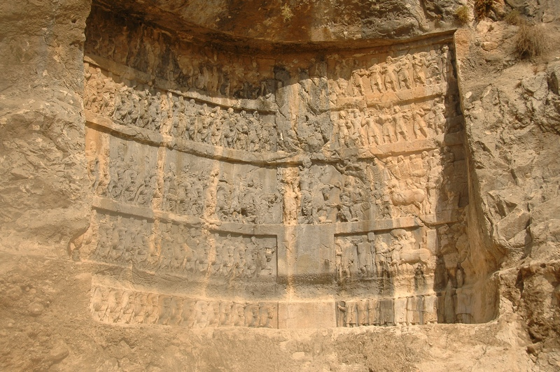 Vista geral do terceiro relevo de Bixapur no qual Sapor recebe uma delegação de Emessa submetendo a cidade.